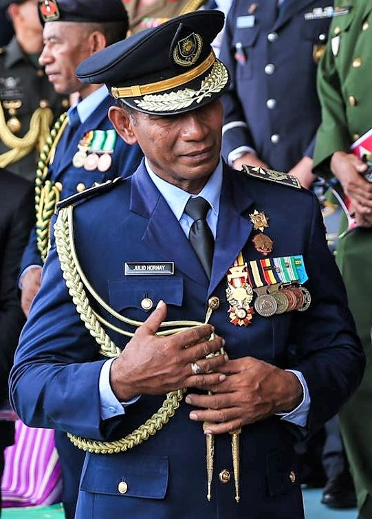 Cerimónia do 19.º Aniversário da Polícia Nacional de Timor-Leste, Júlio Hornay